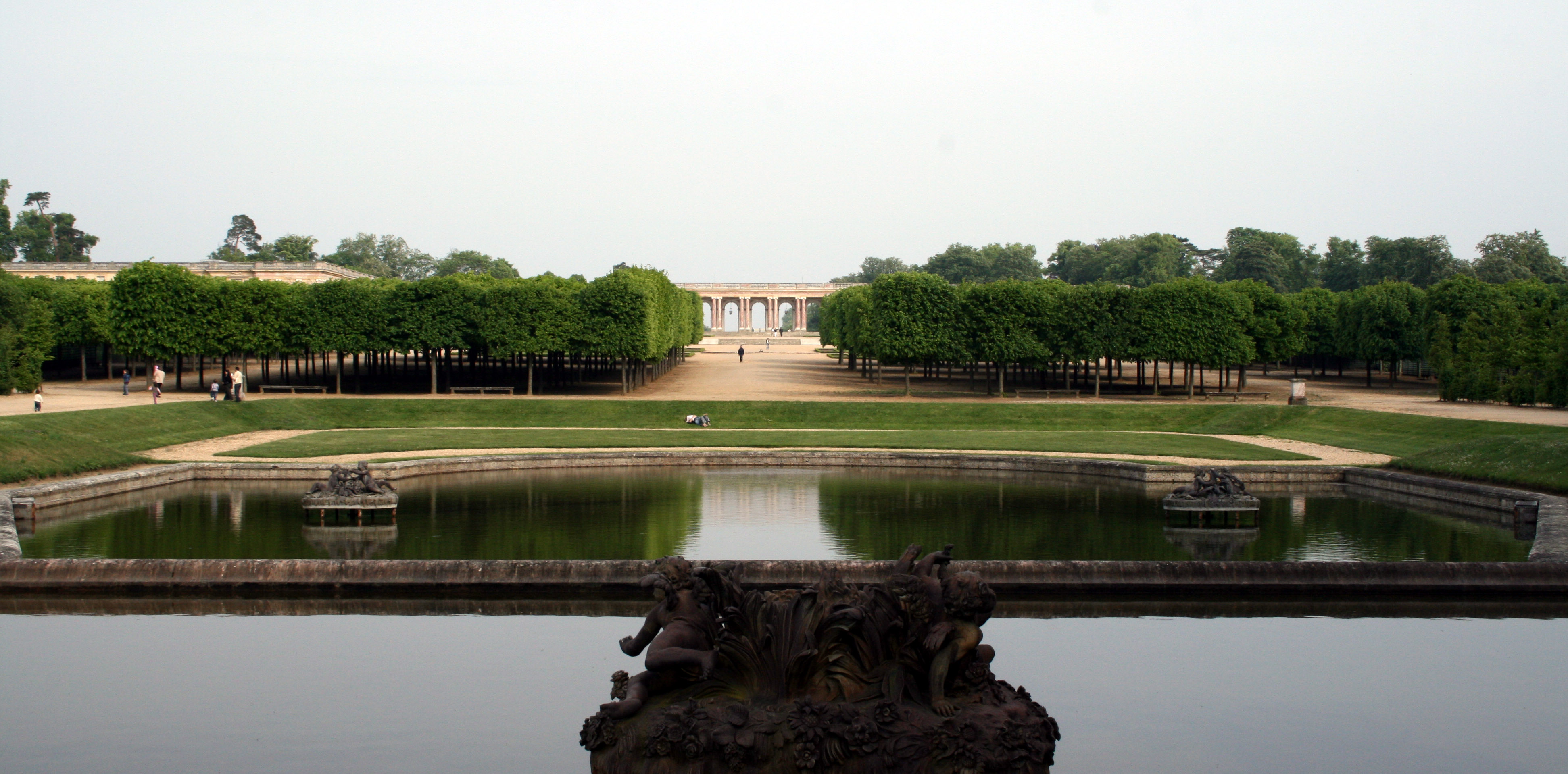 Bassin Plat fond au Grand Trianon à Versailles